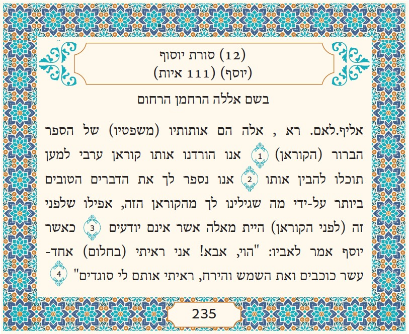 סורת יוסף